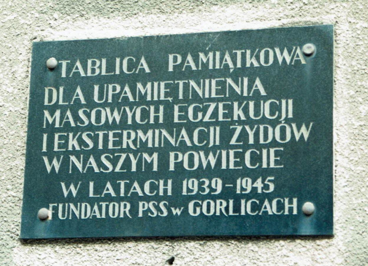 שלט זיכרון על קיר בית הכנסת. צולם בעת ביקור בעיר ב-1996